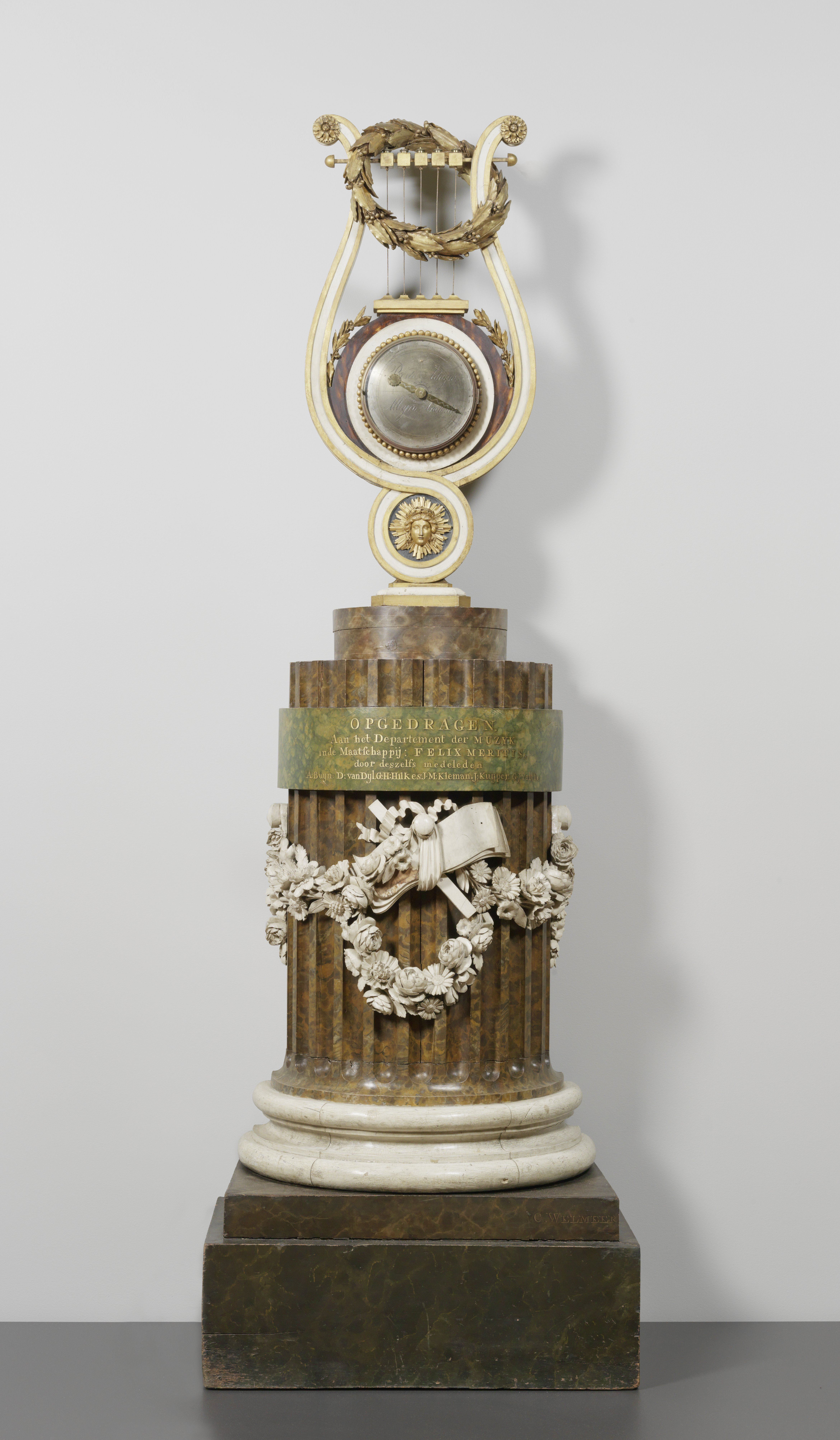 Metronoom in de vorm van een lier op een gecanneleerde doorgezaagde kolom als voetstuk. het uur- en slagwerk is in de lier geplaatst, die met een laurierkrans is omhangen. De kolom is met een bloemenkrans versierd. Op het plint, waarop de lier staat, zijn notenbalken aangebracht. Op de schacht van de kolom de volgende inscriptie: OPGEDRAGEN AAN HET DEPARTEMENT DER MUZIJK IN DE MAATSCHAPPIJ FELIX MERITIS DOOR DESZELFS MEDELEDEN. A. BUIJN, D. VAN DIJL, C.G.N. HILKER, I.M KLEMAN, J. KUYPER, G.J. PALTHE. Op het plint de naam van de maker: C. Welmeer. In guirlande om de gecanneleerde kolom gedateerd: 1803.